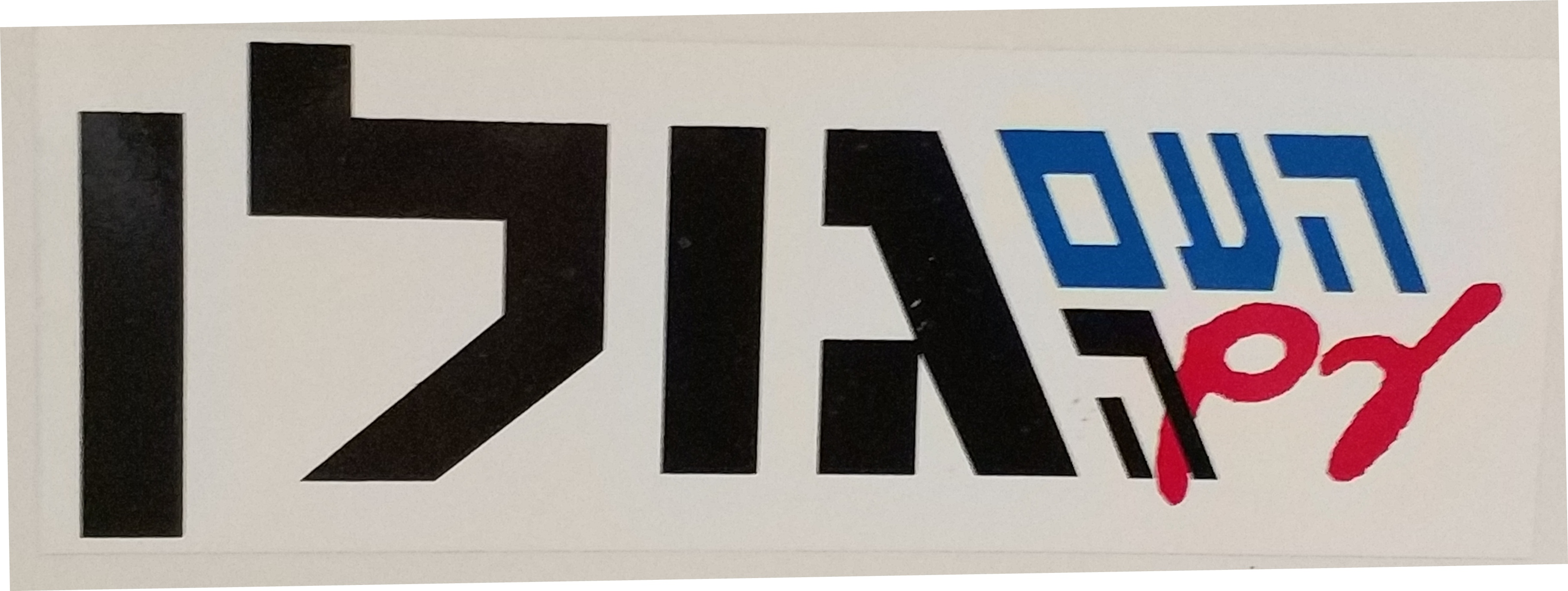 סטיקר העם עם הגולן